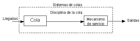 elementos básicos de la teoría de colas